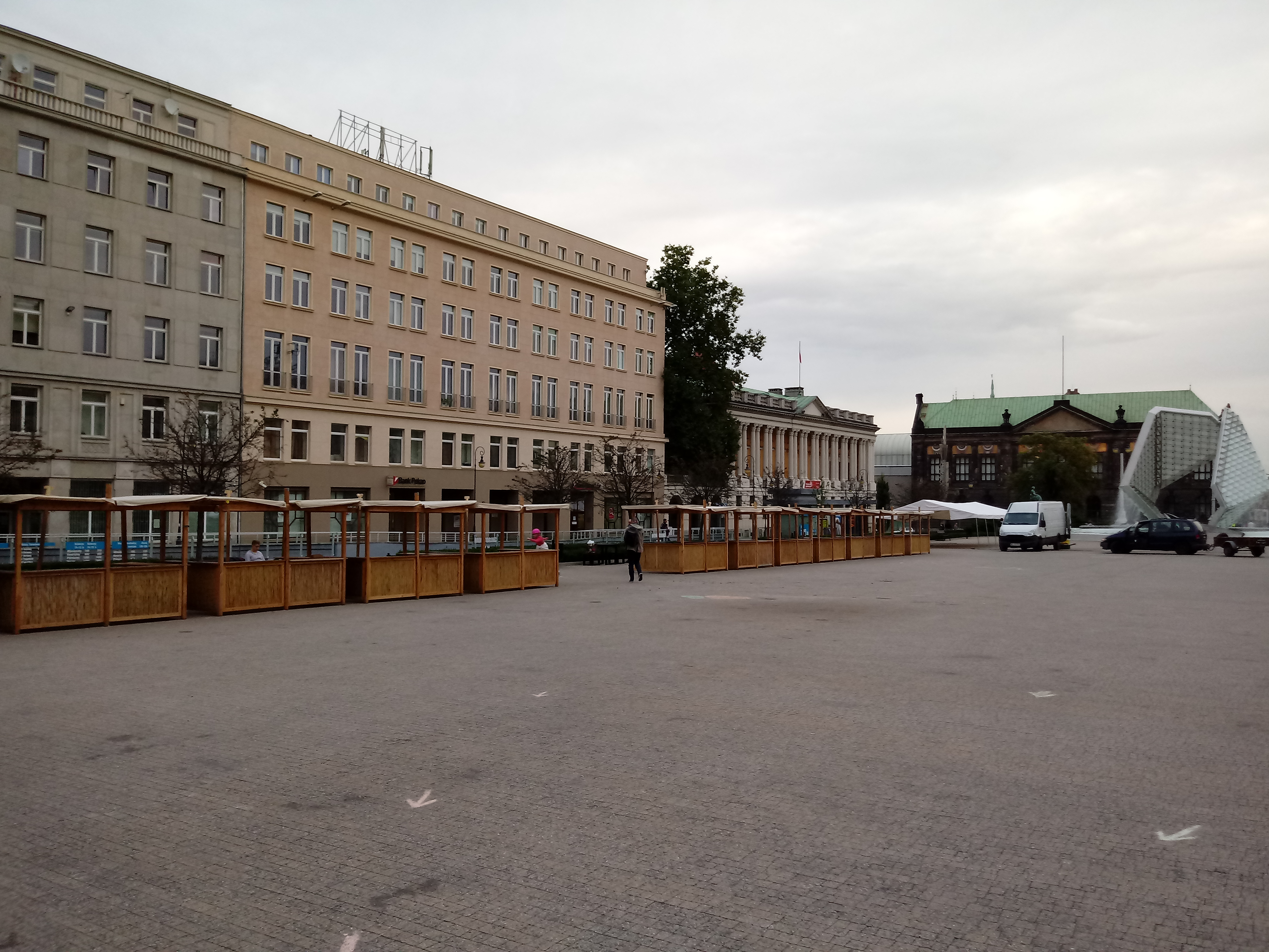 Plac Wolności w Poznaniu, pierzeja północna od strony wschodniej